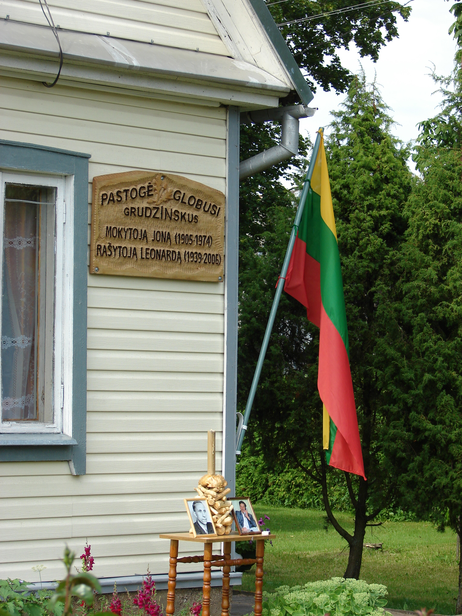 Namas Vyžuonose, kuriame užaugo rašytojas Leonardas Grudzinskas